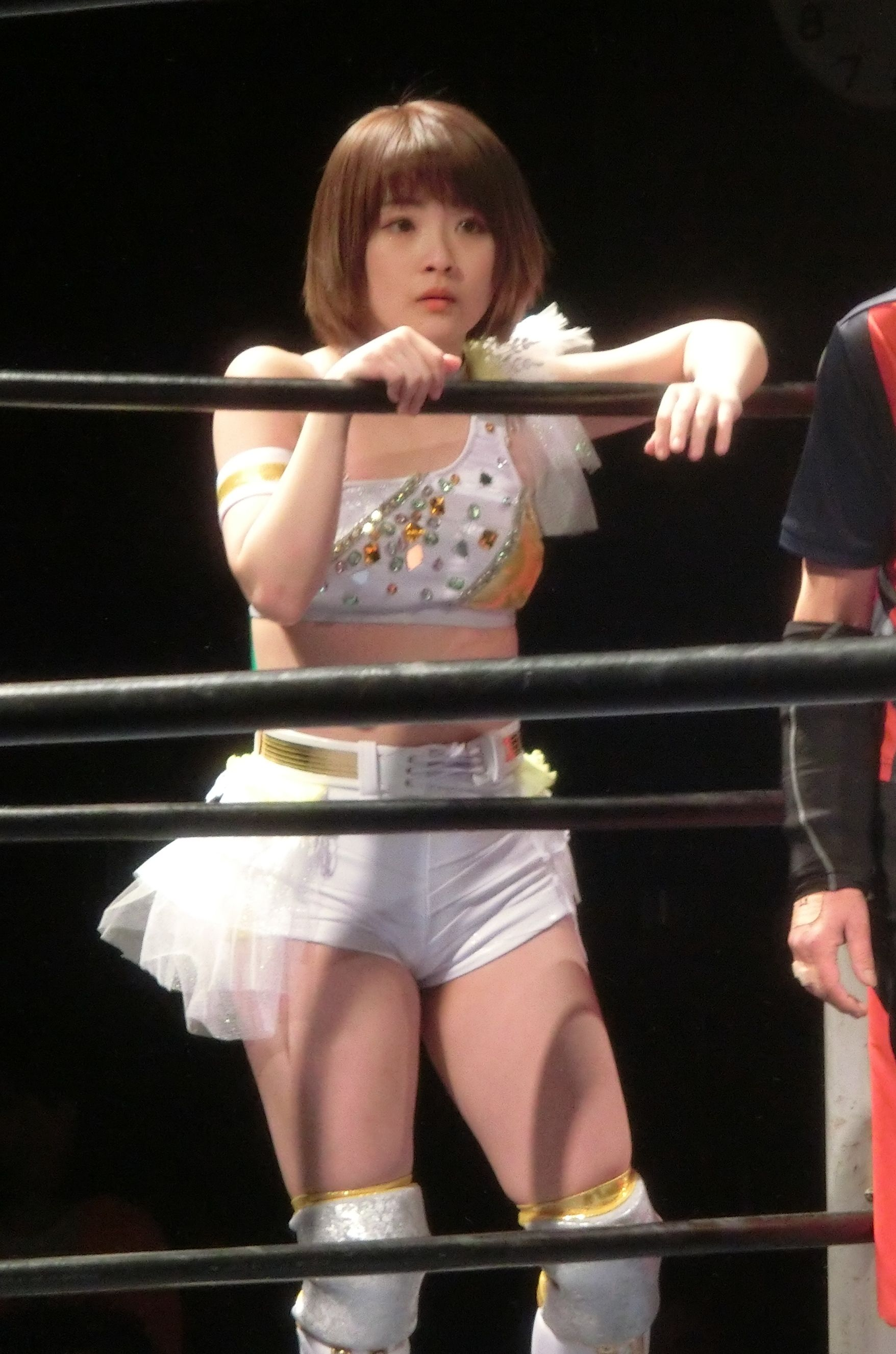 beginning